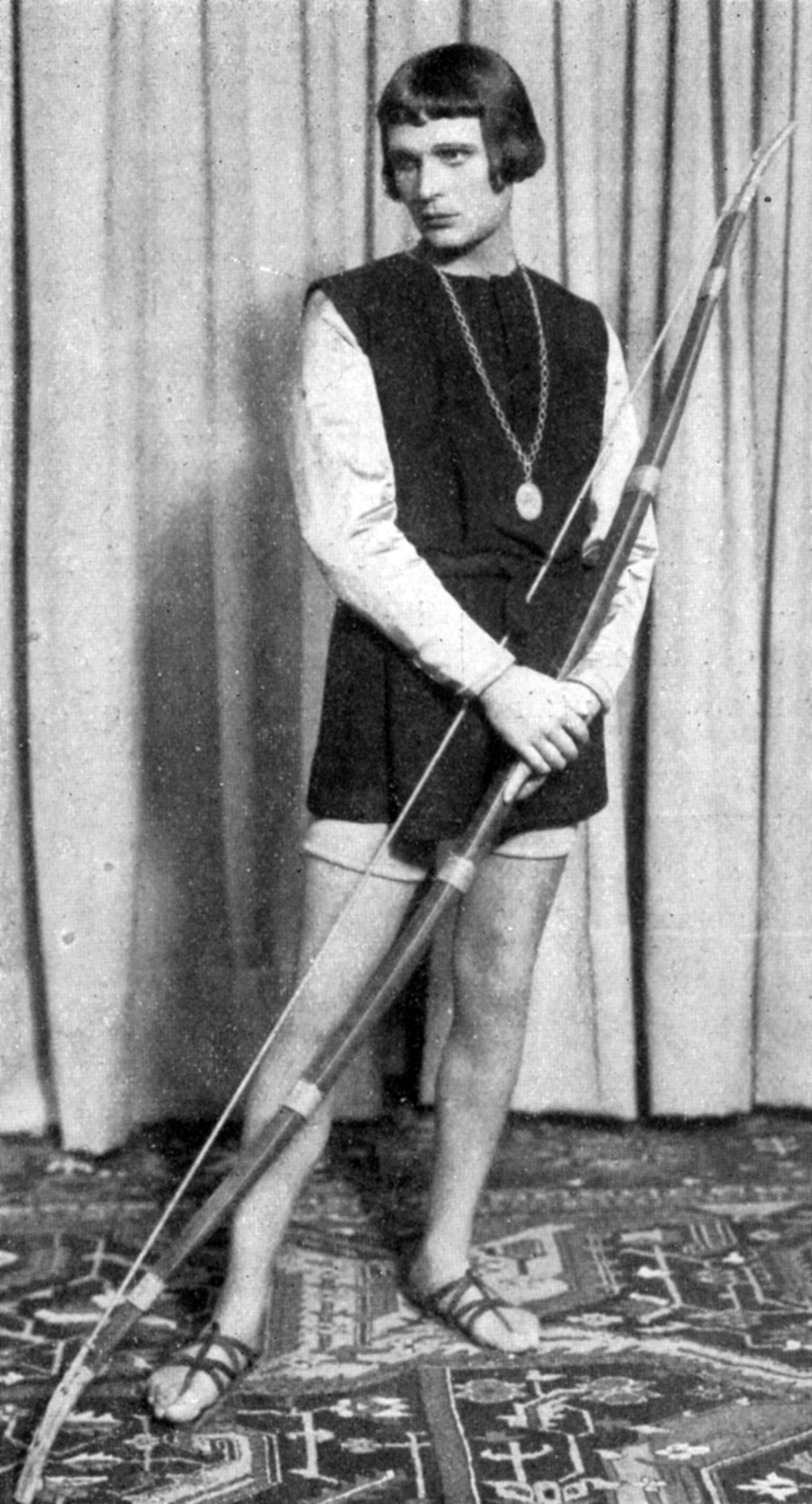 photographie